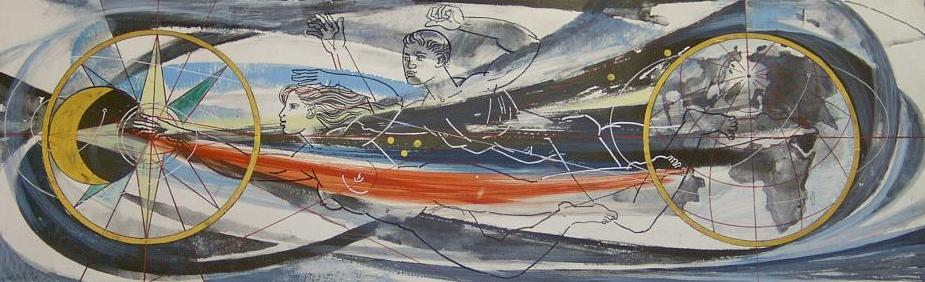 Bildbeschreibung: "Der Mensch gestaltet seine Welt". Bildfries von Walter Womacka im ehemaligen Ministerium für Auswärtige Angelegenheiten der DDR.